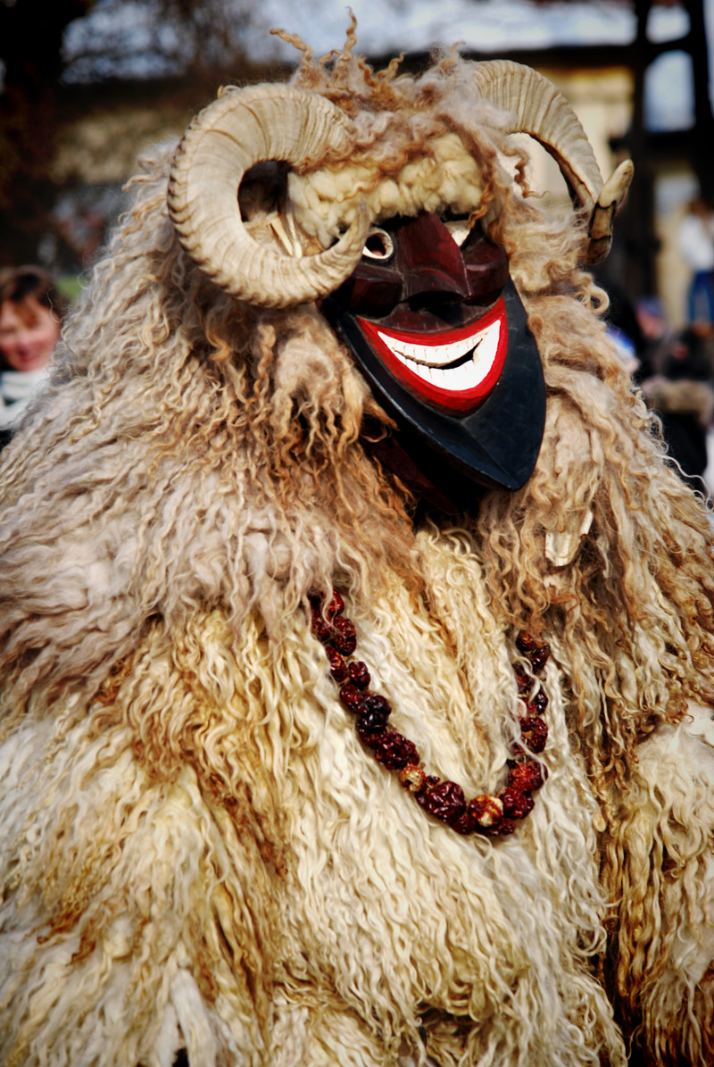 Porté egy mohácsi busóról